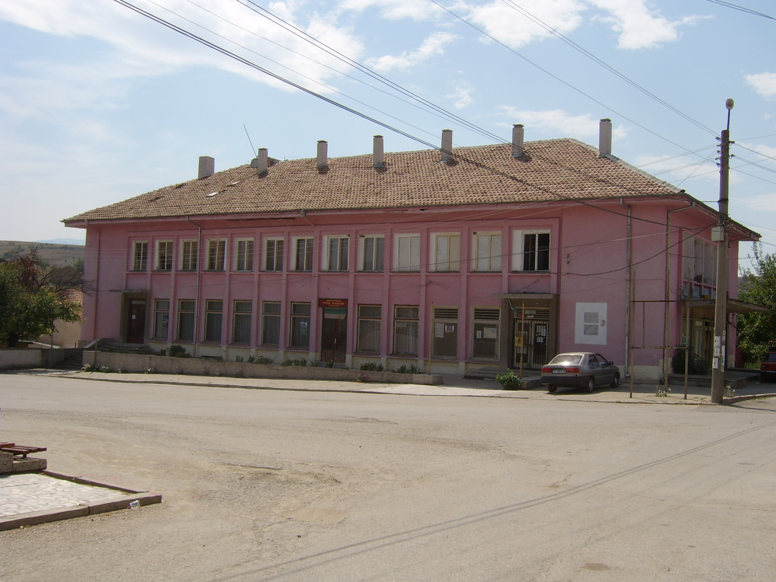 Читалище "Отец Паисий" в с.Левуново. В сградата се помещават пощенската станция и библиотеката. Преди години там беше Тото пункта (сега е в пощата), до 90-те години в ритуалната зала на читалището се сключваха граждански бракове. Имаше и кино салон, който изгоря през 1988 г. © 2006 Иван Пачов